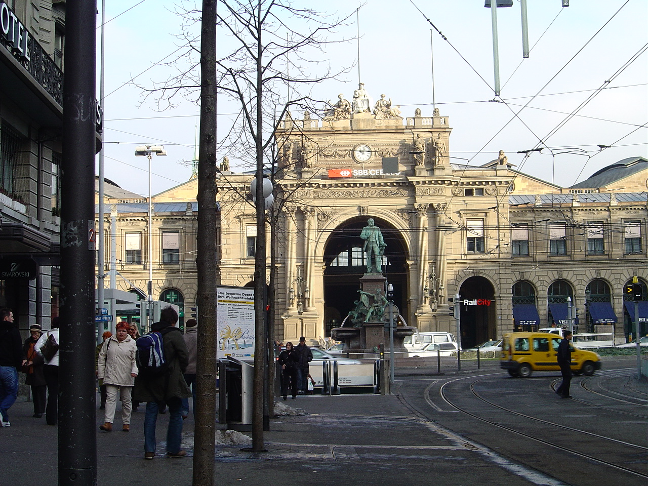 蘇黎世車站大街。